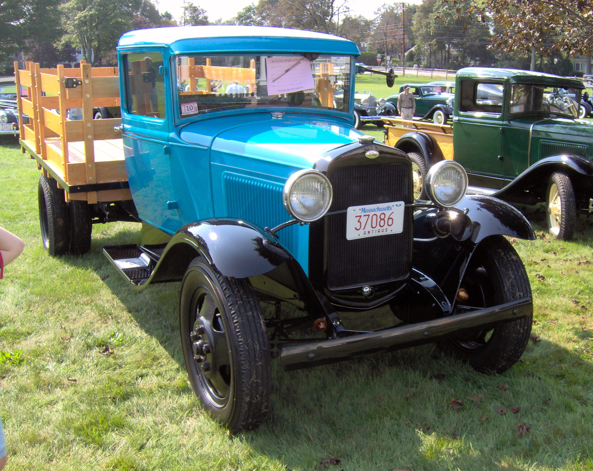 1930 Ford Model AA stake-bed truck